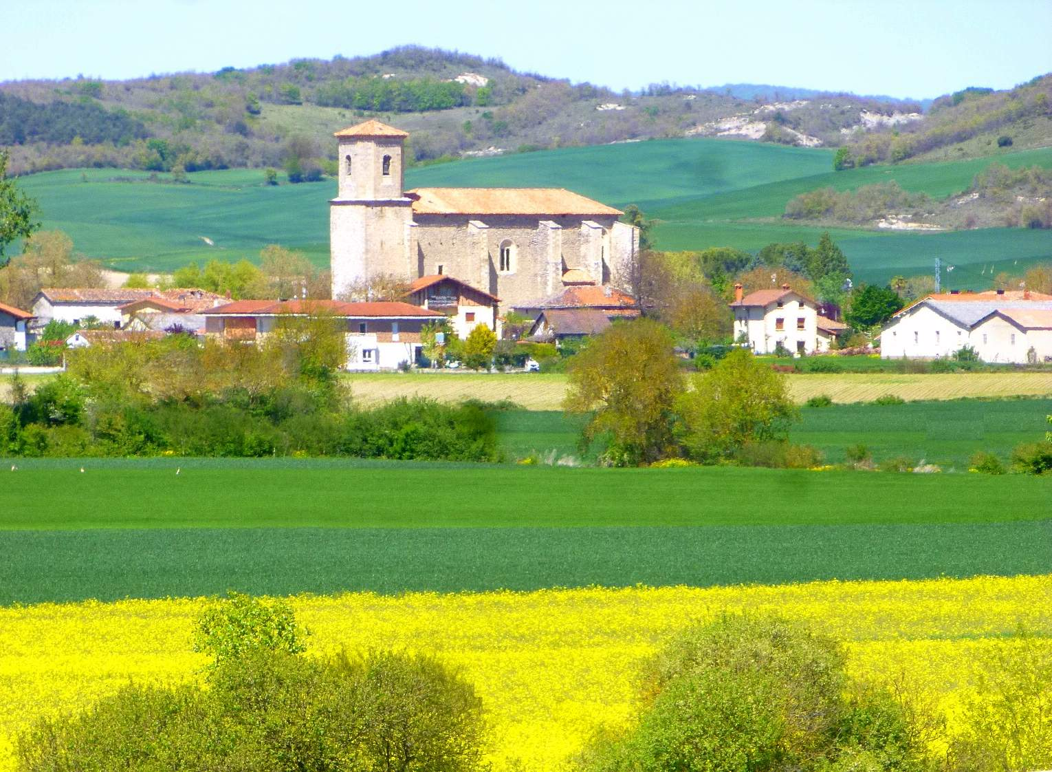 Aránguiz (Vitoria, Álava)